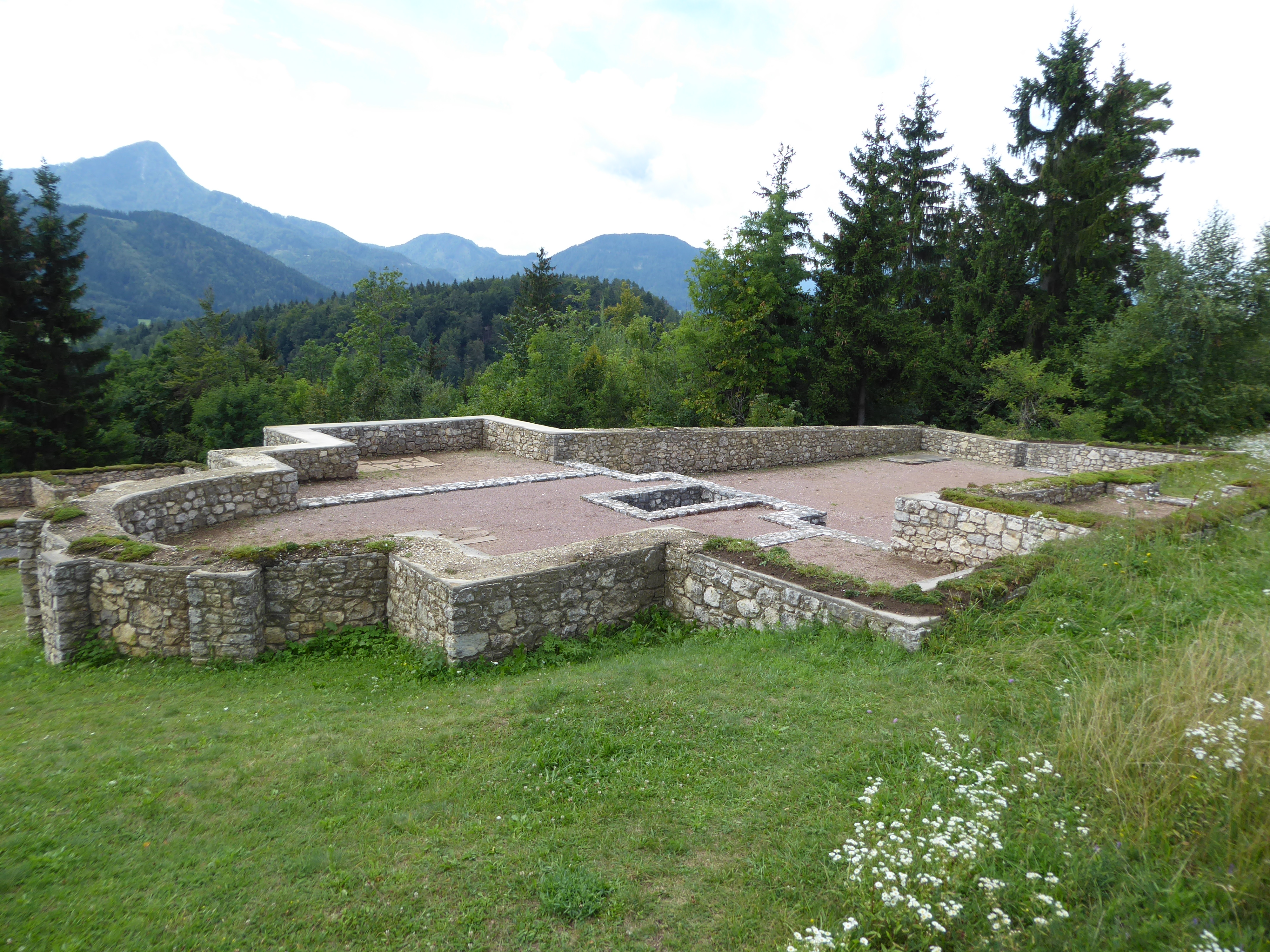 Hemmaberg, Globasnitz, Kärnten - Westliche Doppelkirche: Taufkirche (nördl.)